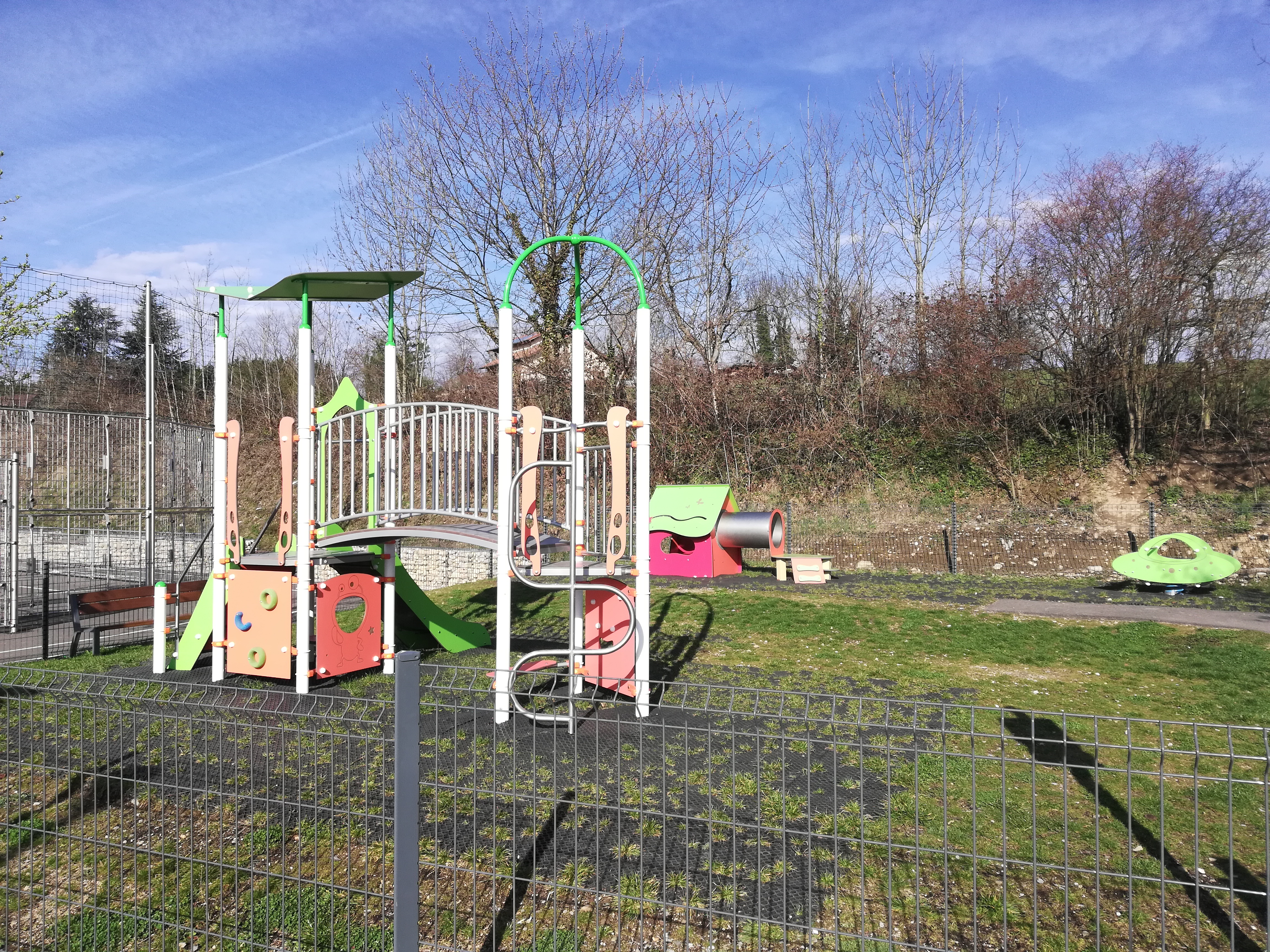 Jeux pour jeunes enfants de l'espace intergénérationnel City Park de Charnècles